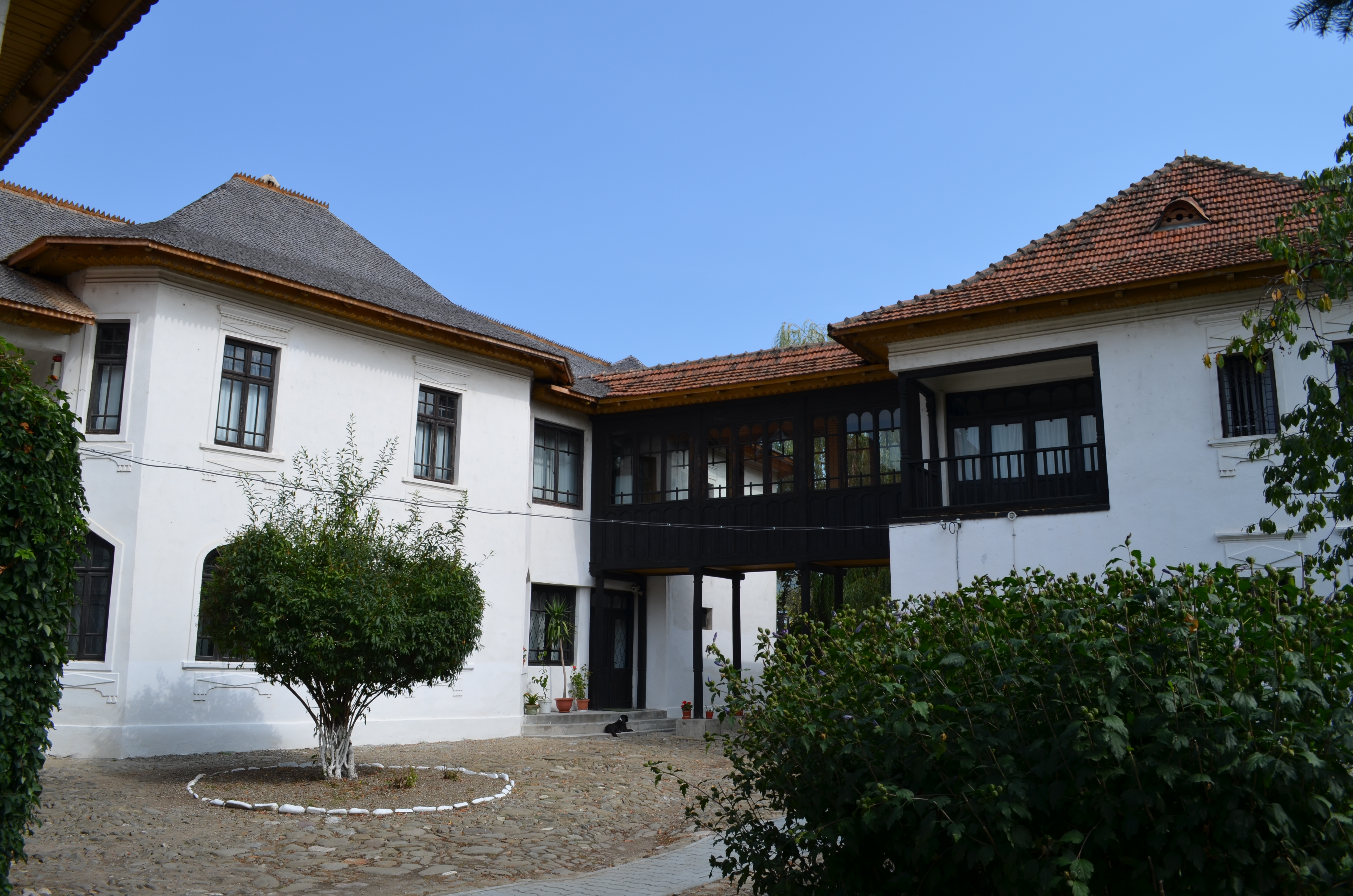 Casa memorială "Nicolae Iorga" din Vălenii de Munte, Prahova - corpul B (în stânga) și corpul C (în dreapta) 01 02